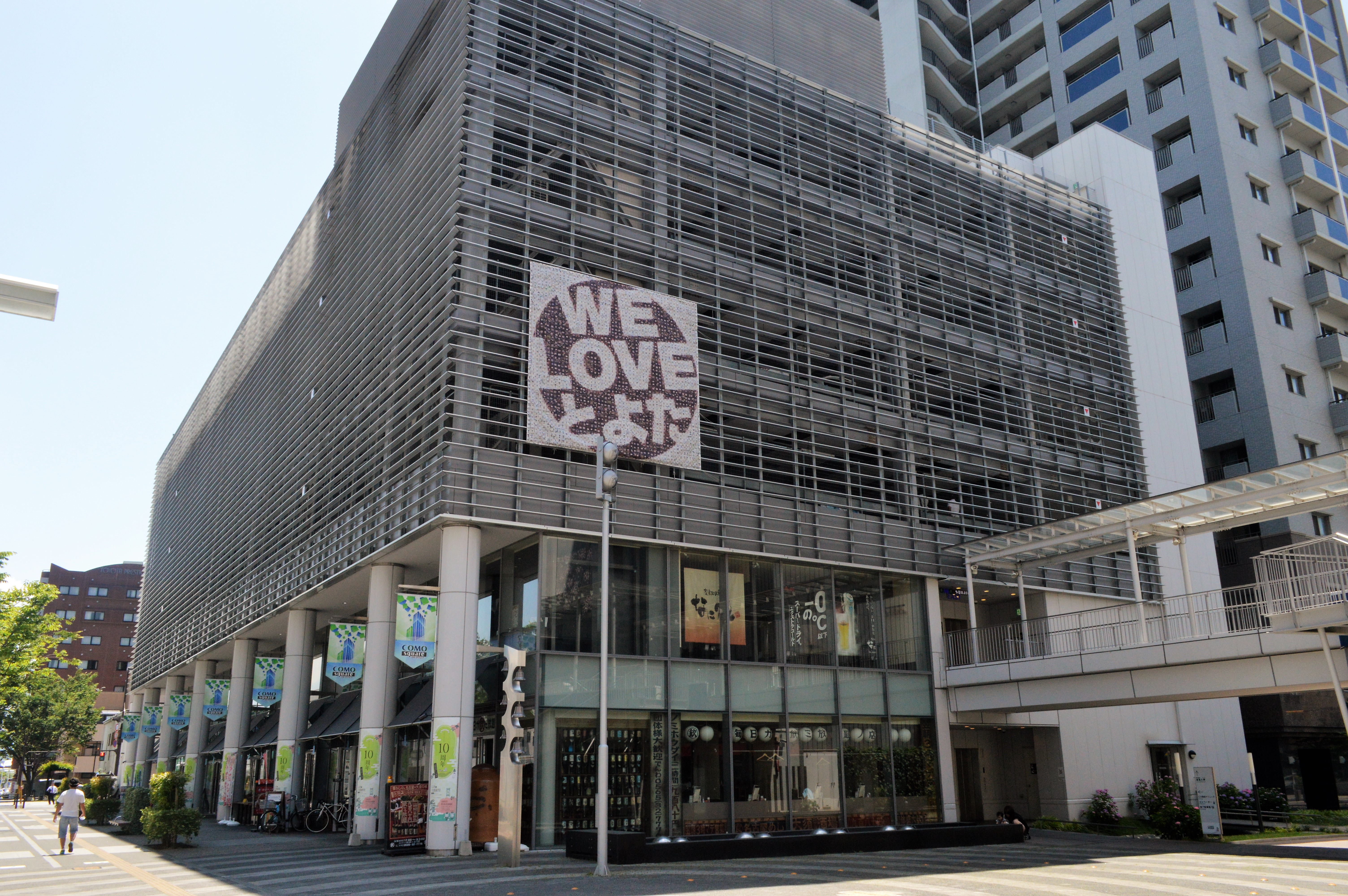 愛知県豊田市にある商業施設「コモ・スクエア イースト」。